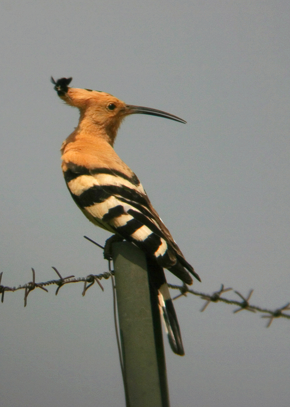 Eurasian Hoopoe